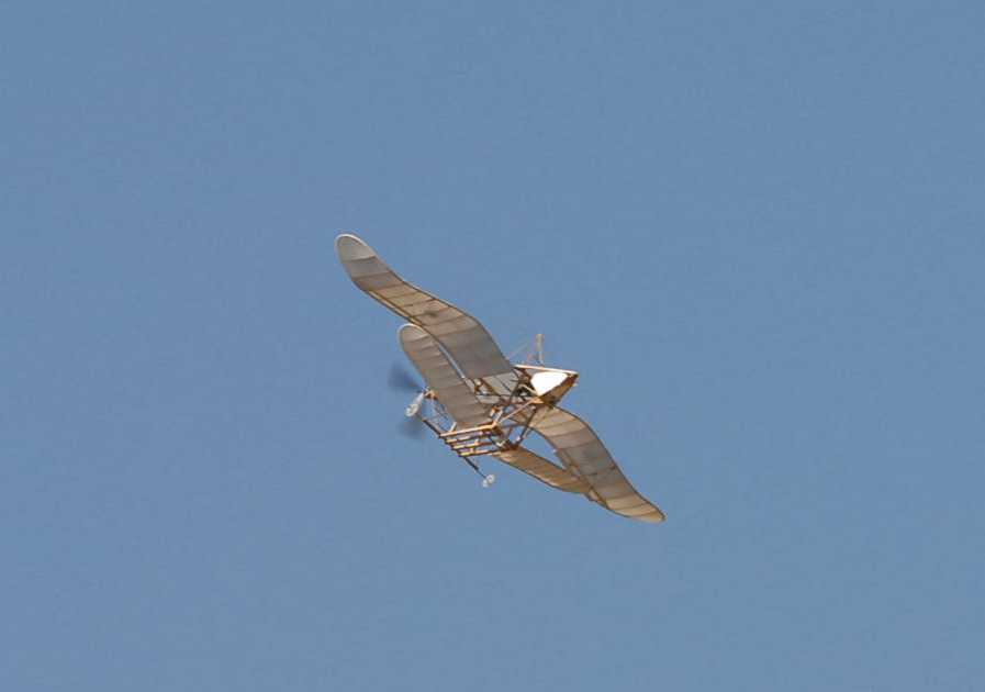 実際に飛行可能な玉虫型飛行器の復元RC模型です。